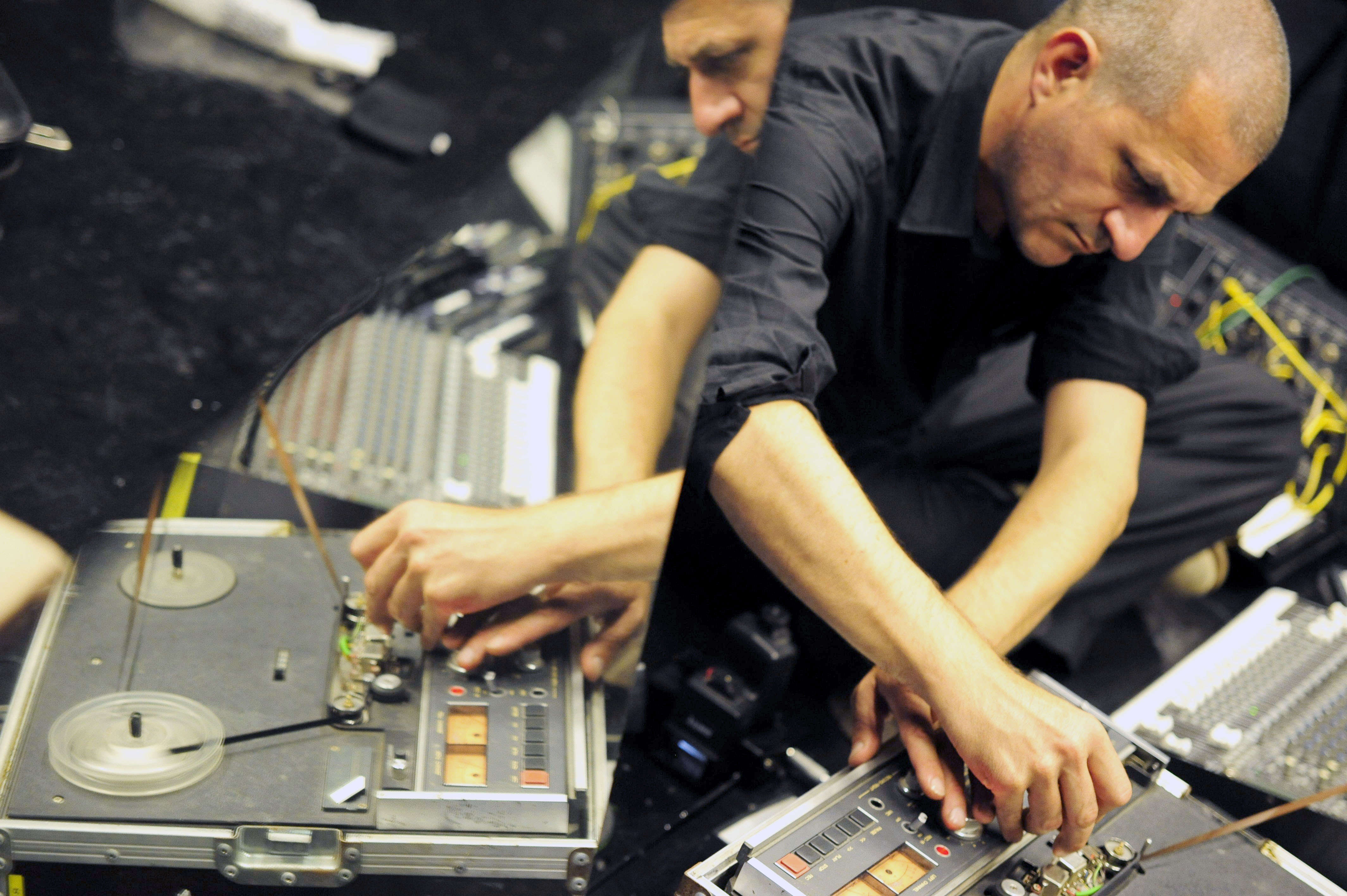 Jérôme Noetinger par Asier Gogortza, 2010, ERTZ festival